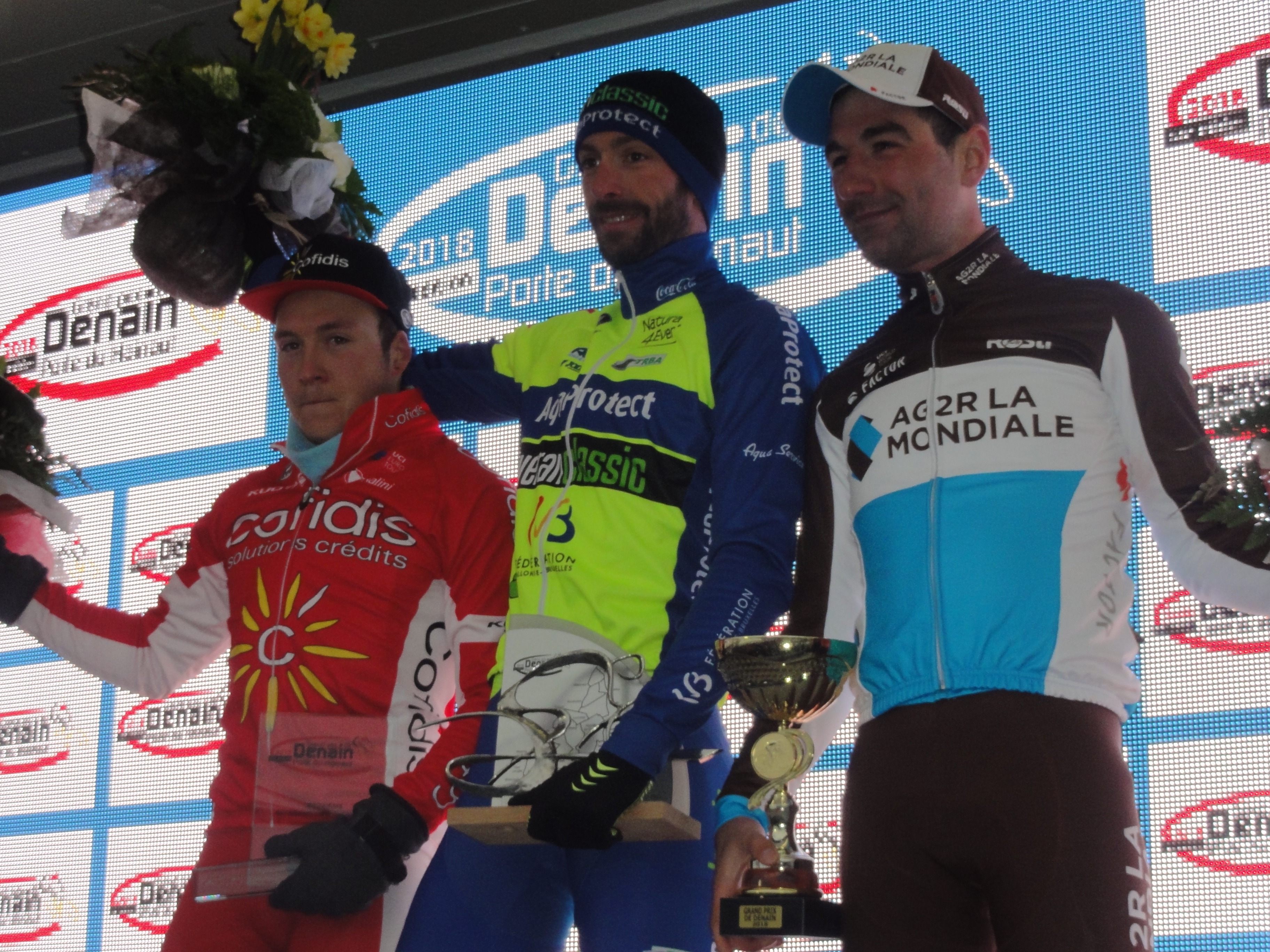 Reportage réalisé le dimanche 18 mars à l'occasion du départ et de l'arrivée du Grand Prix de Denain 2018 à Denain, Nord, Nord-Pas-de-Calais-Picardie, France.